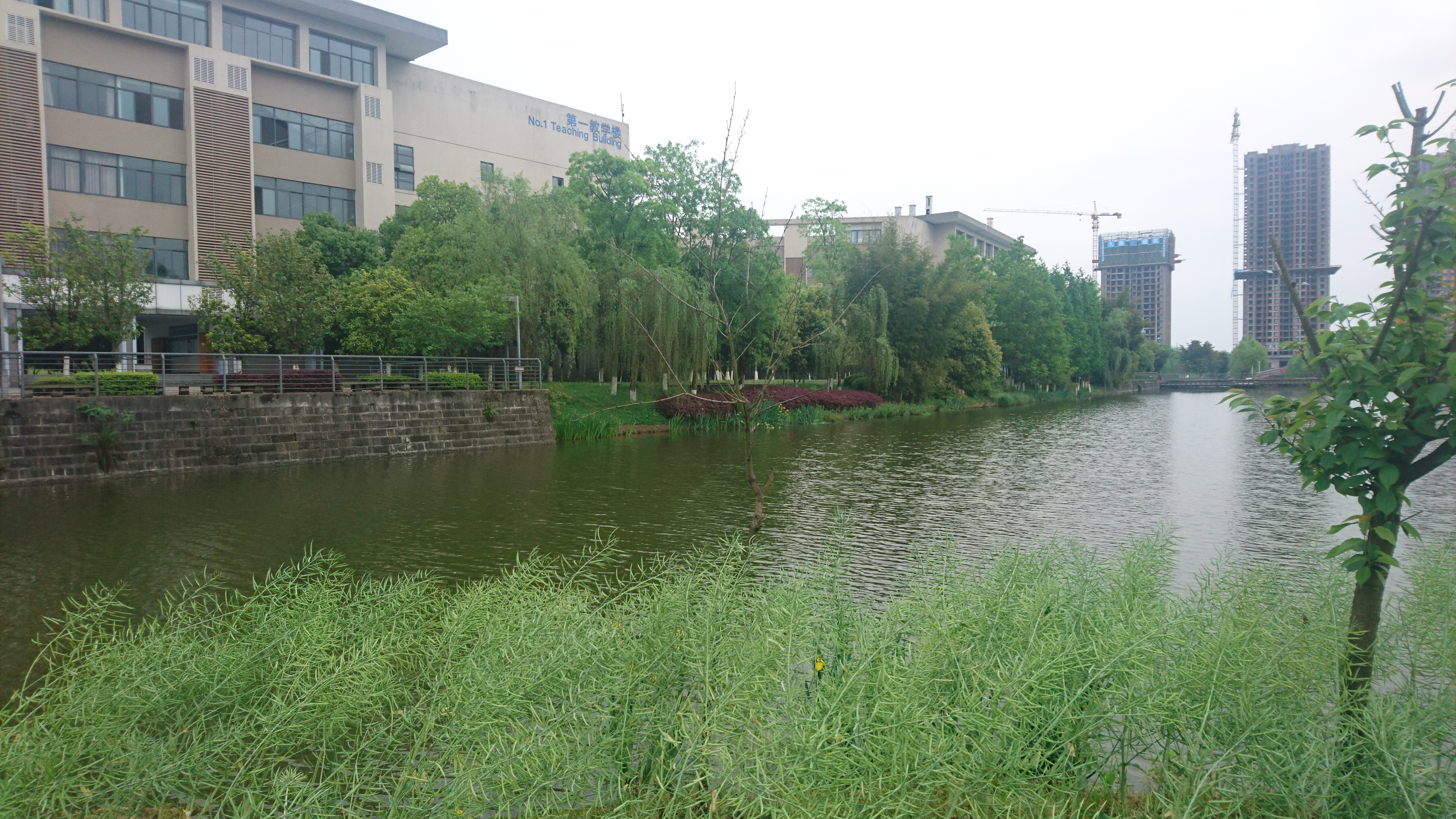 重庆交通大学双福校区第一教学楼，摄于2018年4月6日，李子湖畔